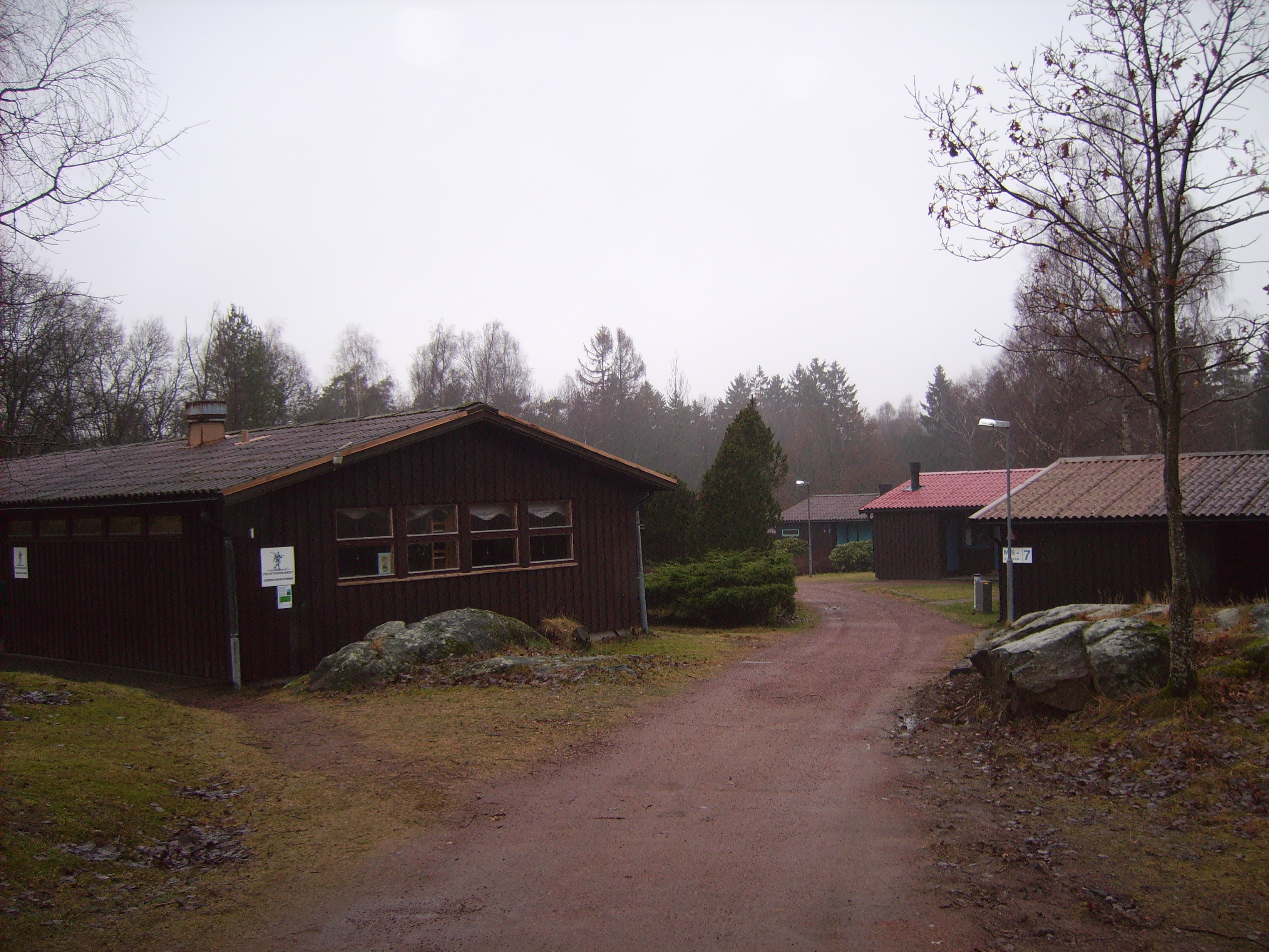 Skatås in Gothenburg.